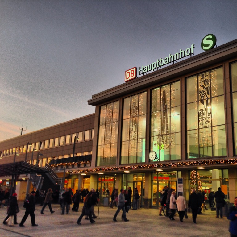 Dortmund Hauptbahnhof in der Weihnachtszeit